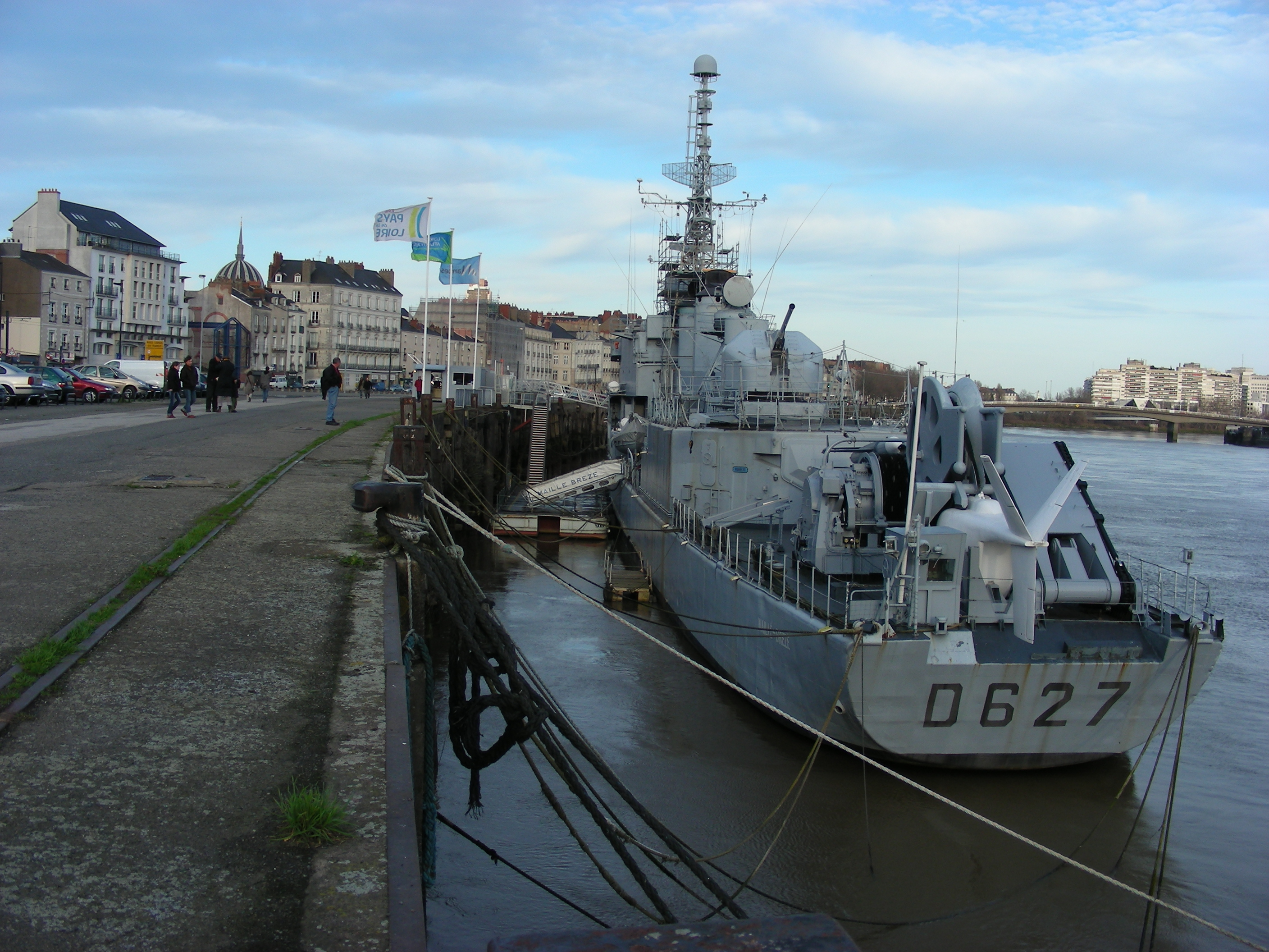 Nantes - Navire musée au quai de la Fosse